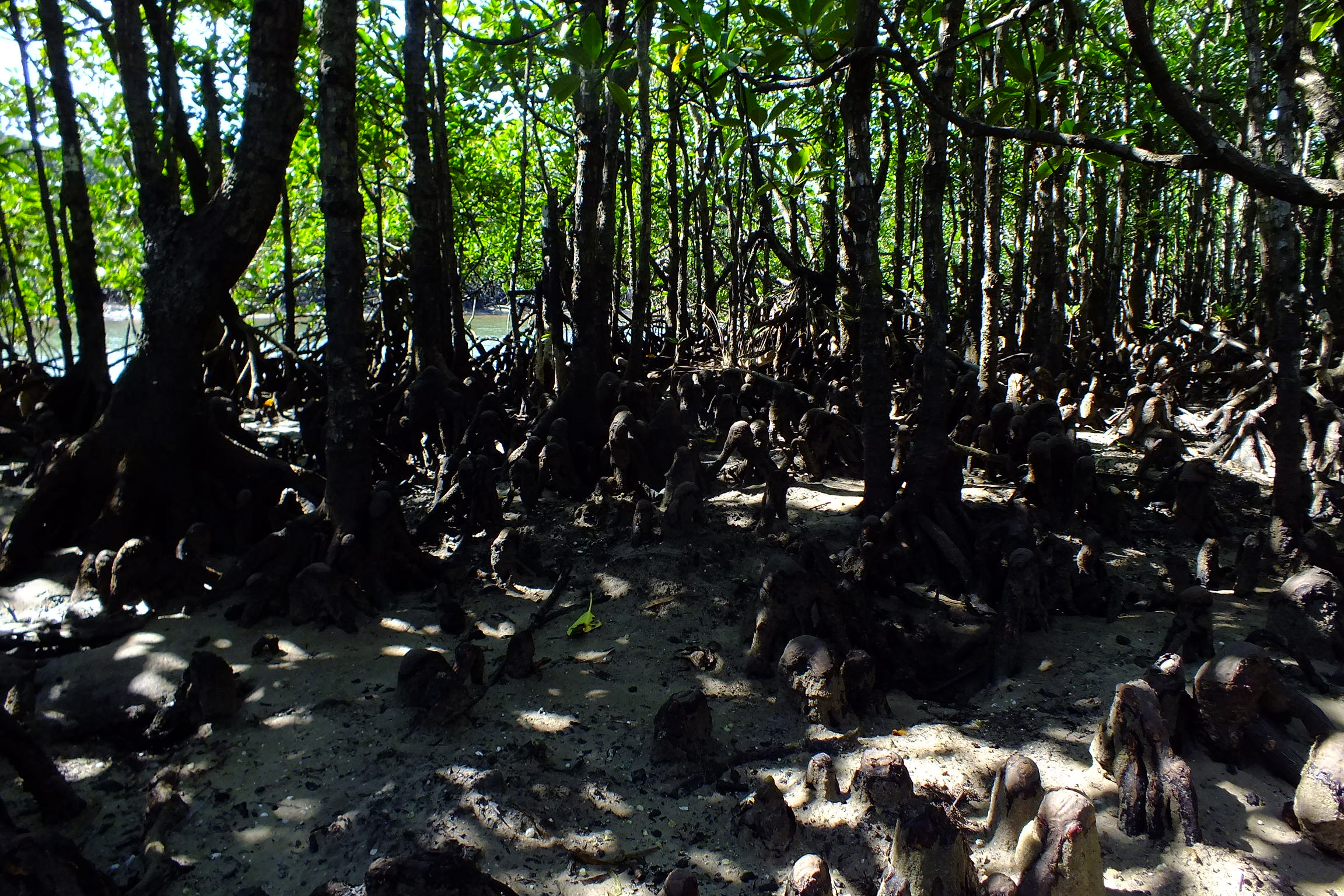 2017-01-29 Komi beach in Iriomotejima,Mangrove of Shiira river 後良川